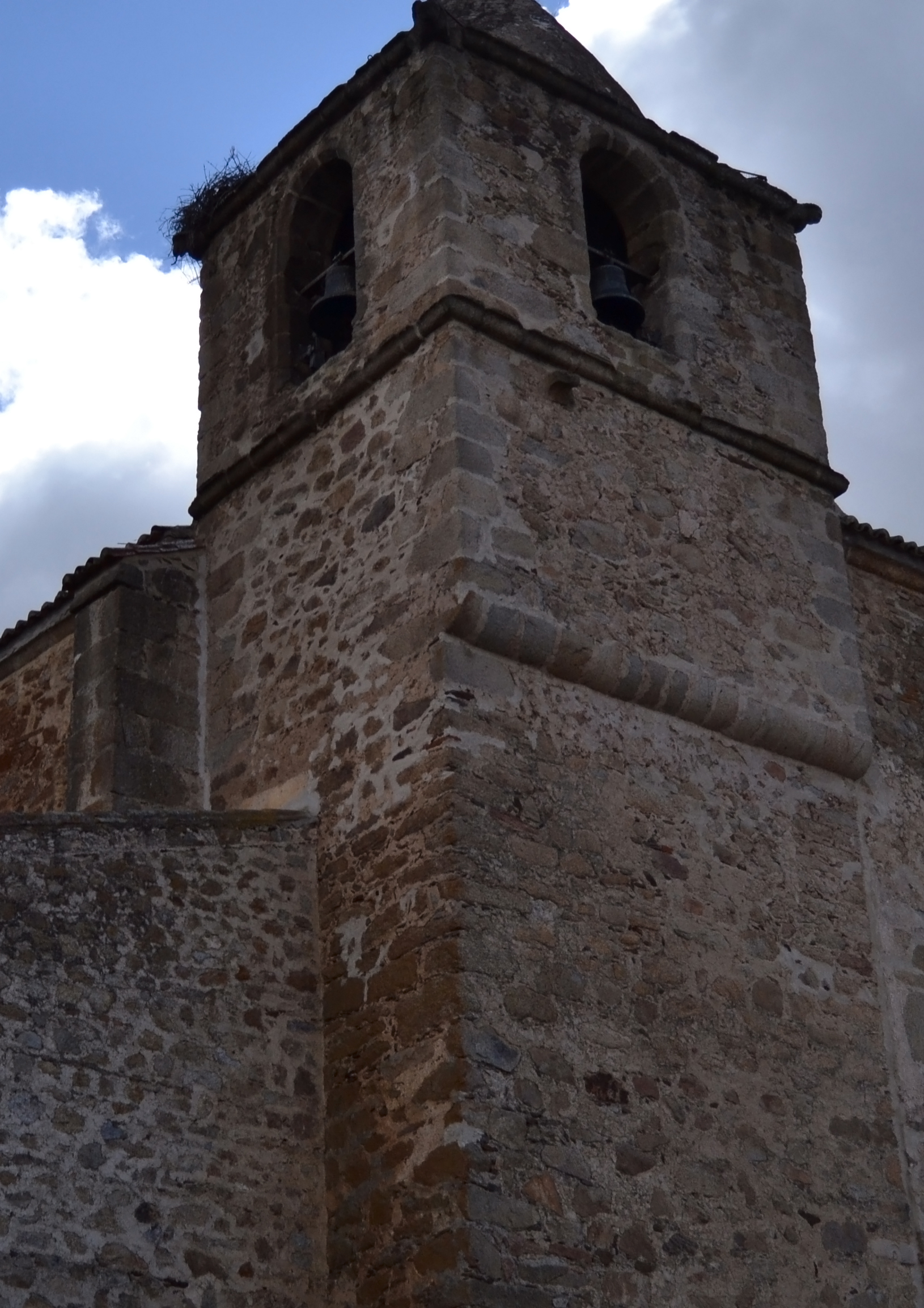 Torre